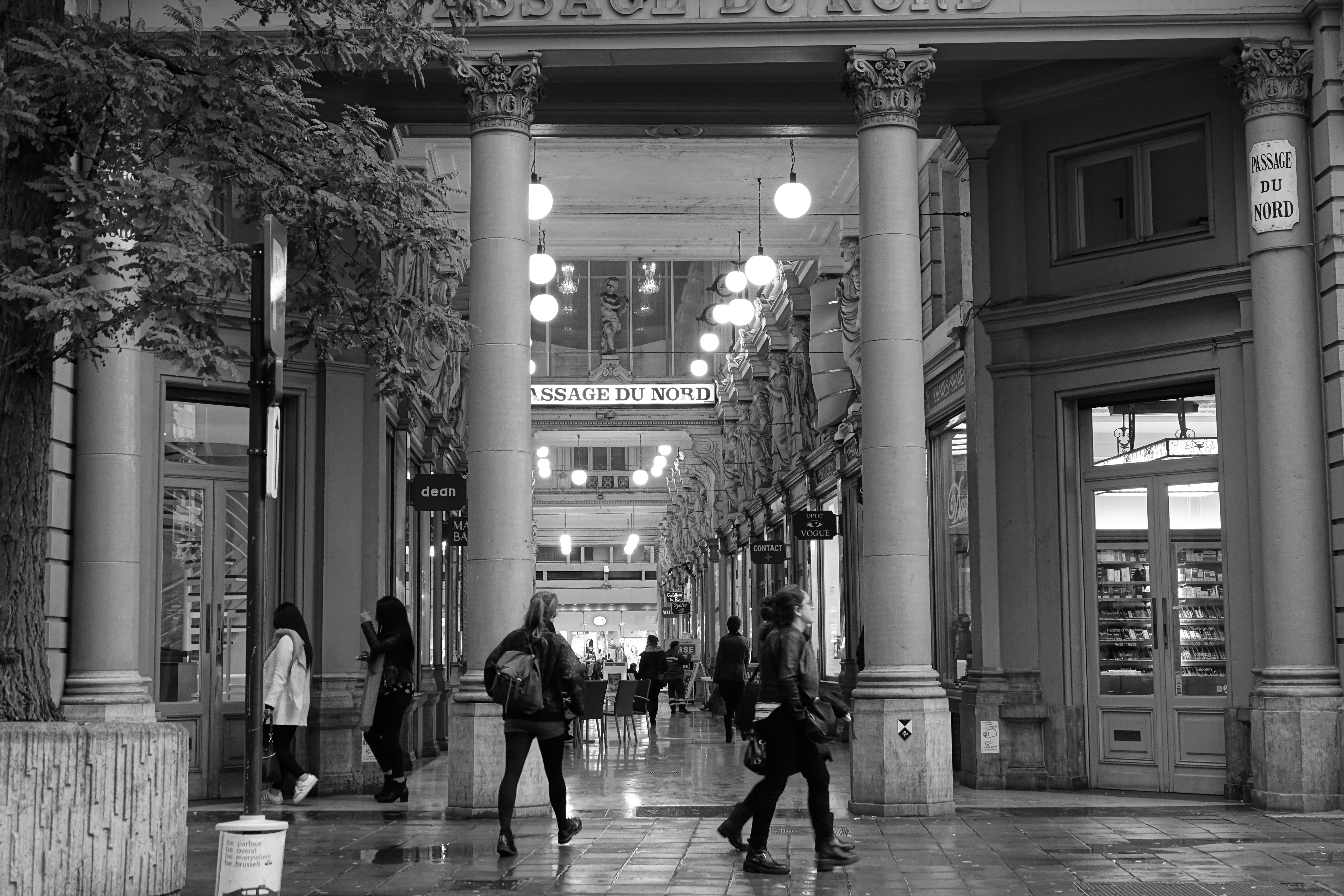 galerie marchande 1881 This photo of immovable heritage has been taken in the Brussels Capital Region